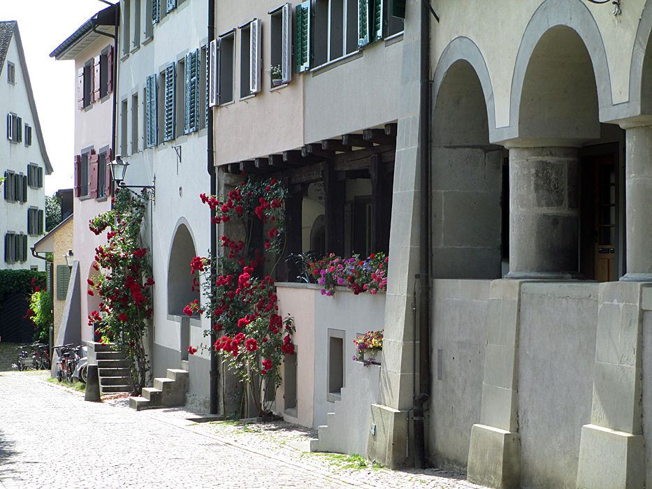 Rapperswil, Hintergasse